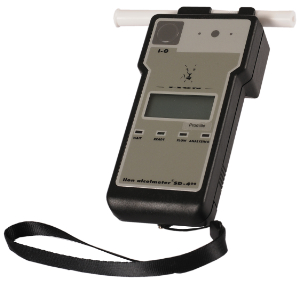 Alkoholmeter som benyttes af det danske Politi - alkoholmeter s-300.